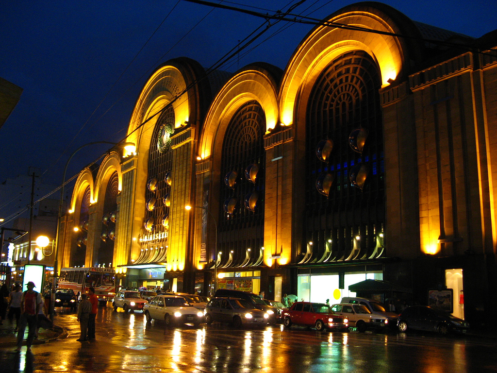 Antiguamente el mercado del abasto de Buenos Aires. Se encuentra en la manzana formada por la Avenida Corrientes y las calles Anchorena, Lavalle y Aguero.